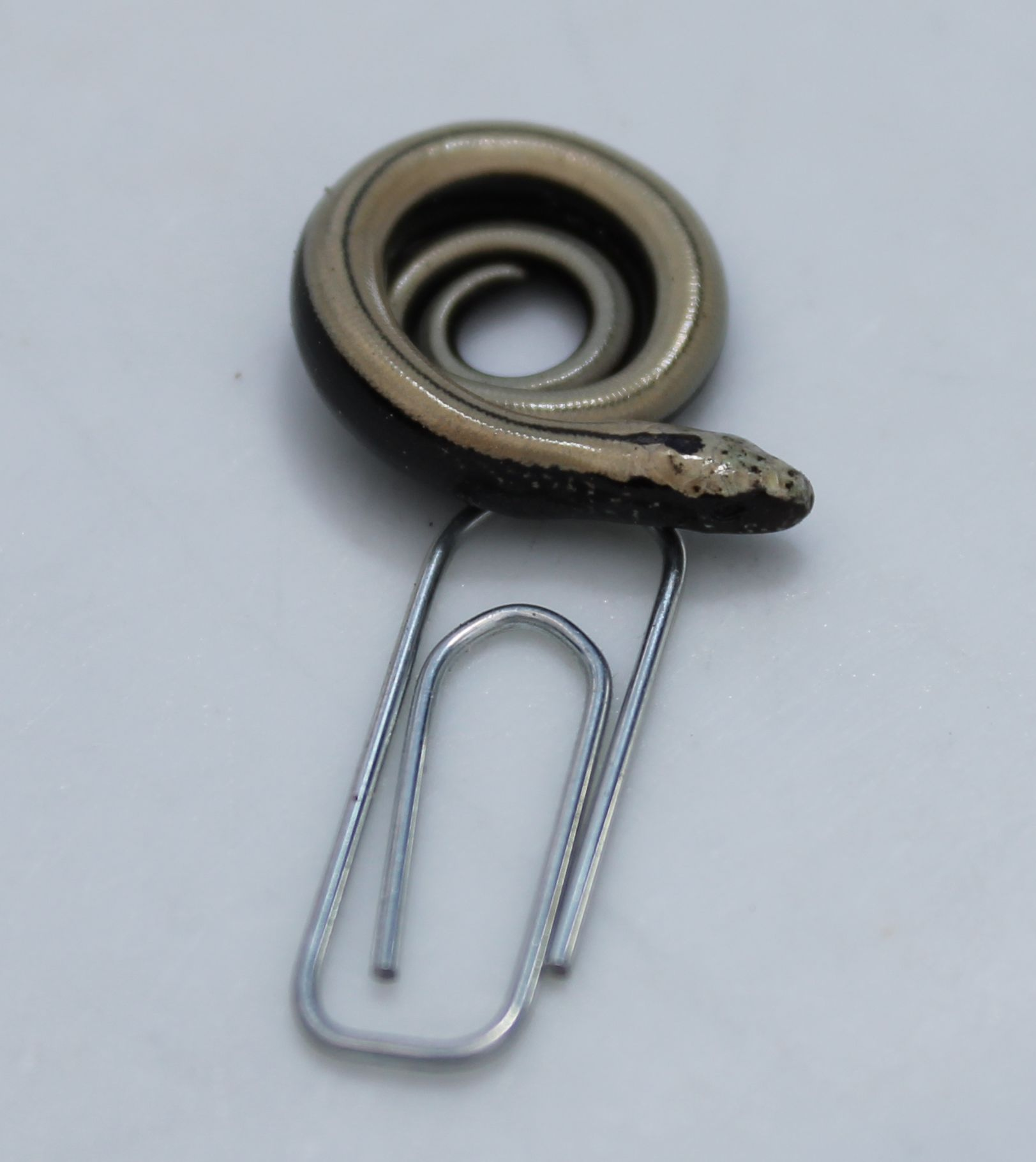 Junge Blindschleiche (82 mm) Alsace; Büroklammer: 25 mm x 9 mm